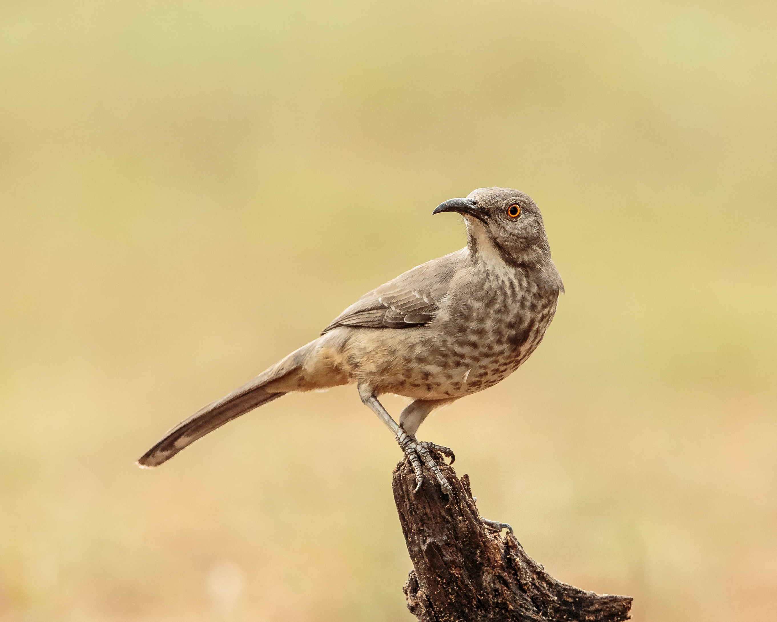 Taken in Texas